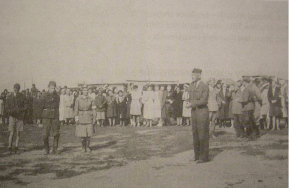 prisonniers de guerre polonais à Zeithain